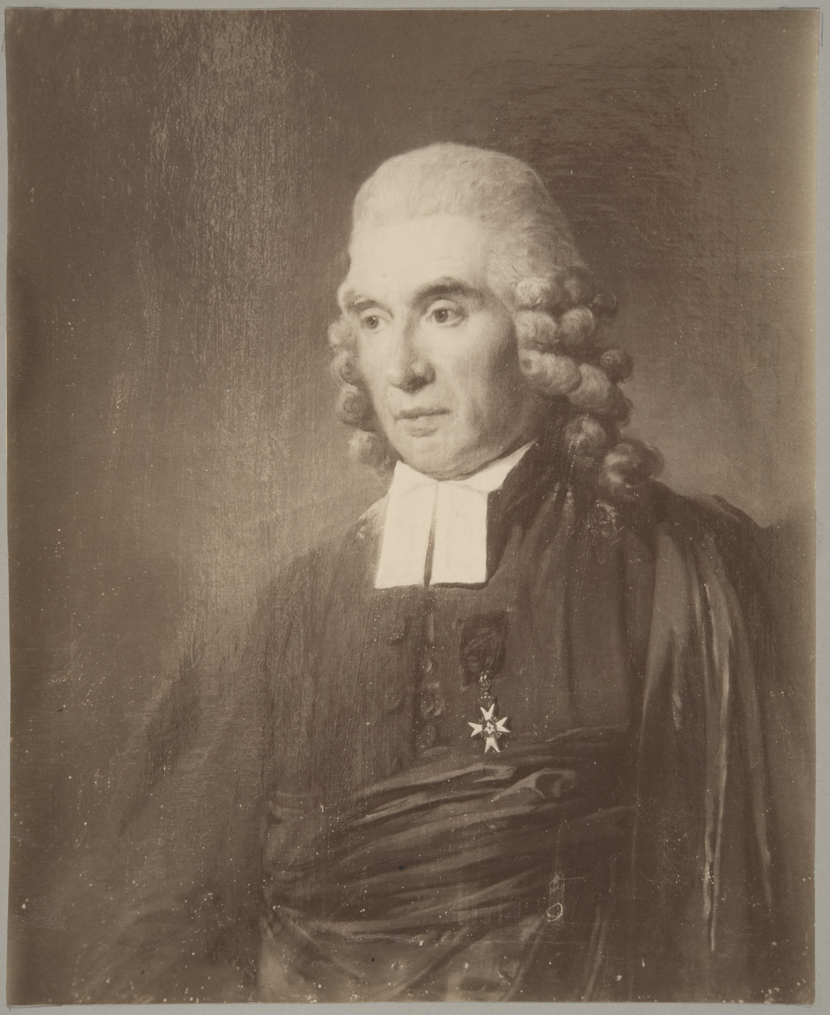 Porvoon hiippakunnan piispa Zacharias Cygnaeus vanhempi, Carl Fredrik von Bredan öljymaalaus